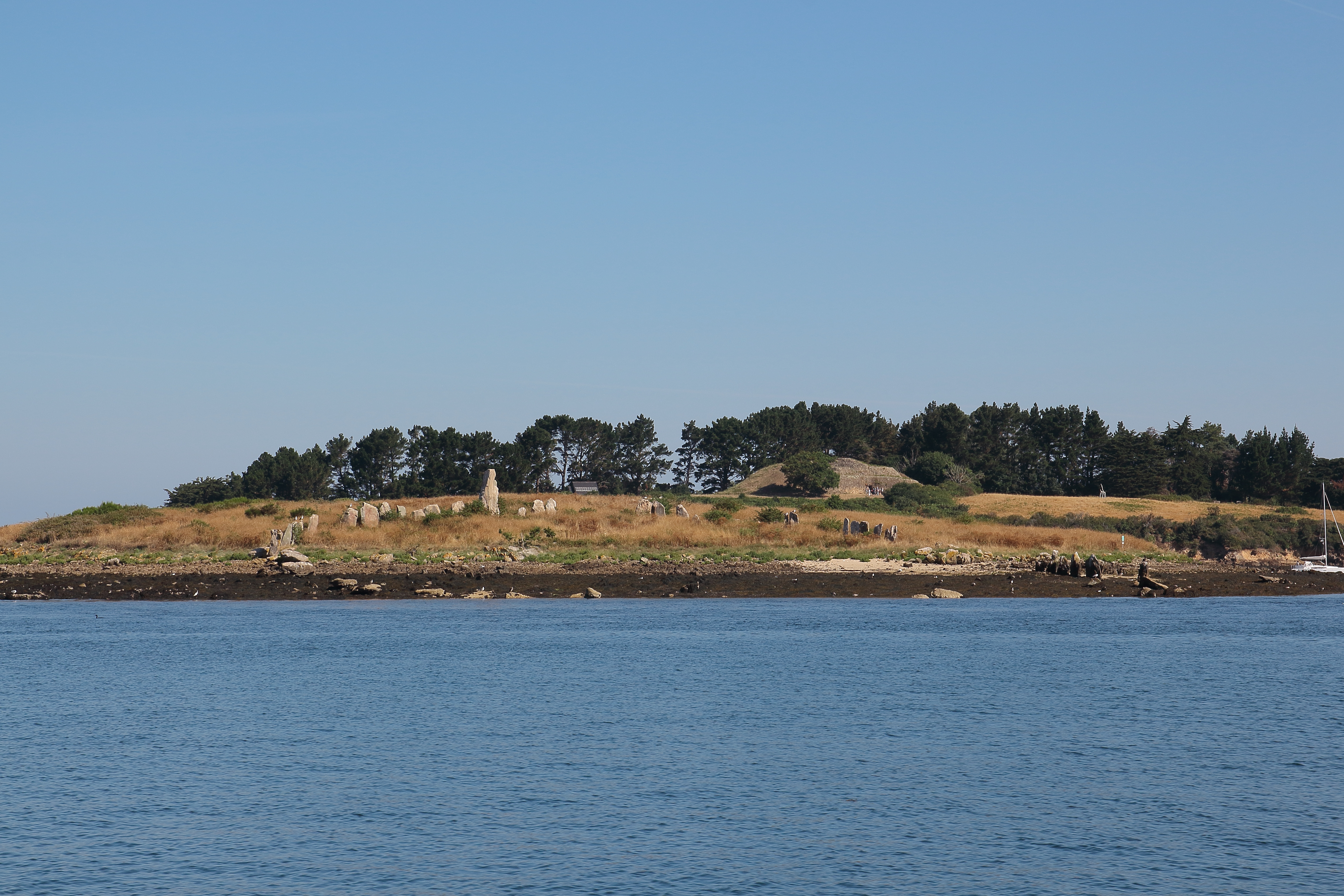 Im Golf de Morbihan: Der Steinkreis auf der Insel "Er Lannic"; im Hintergrund der Cairn auf der Insel Gavrinis